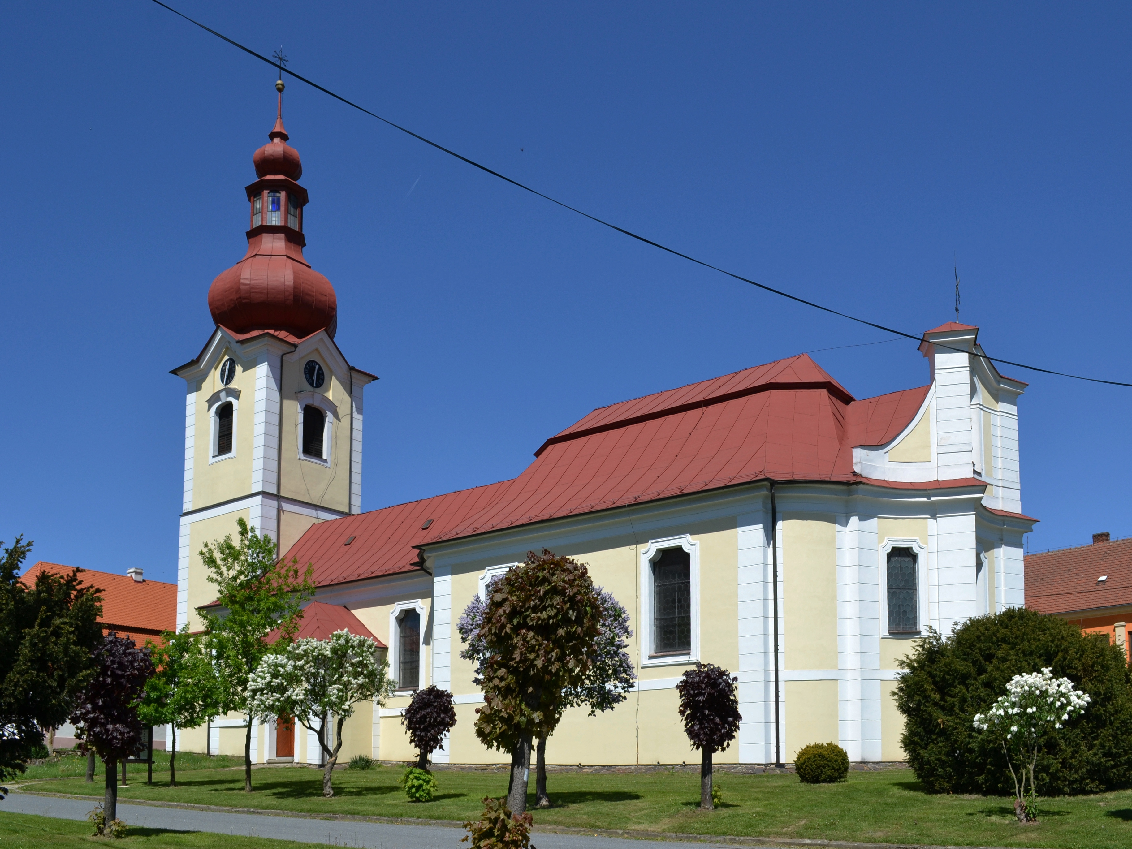 Horní Bobrová - kostel sv. Petra a Pavla, pohled od jihu